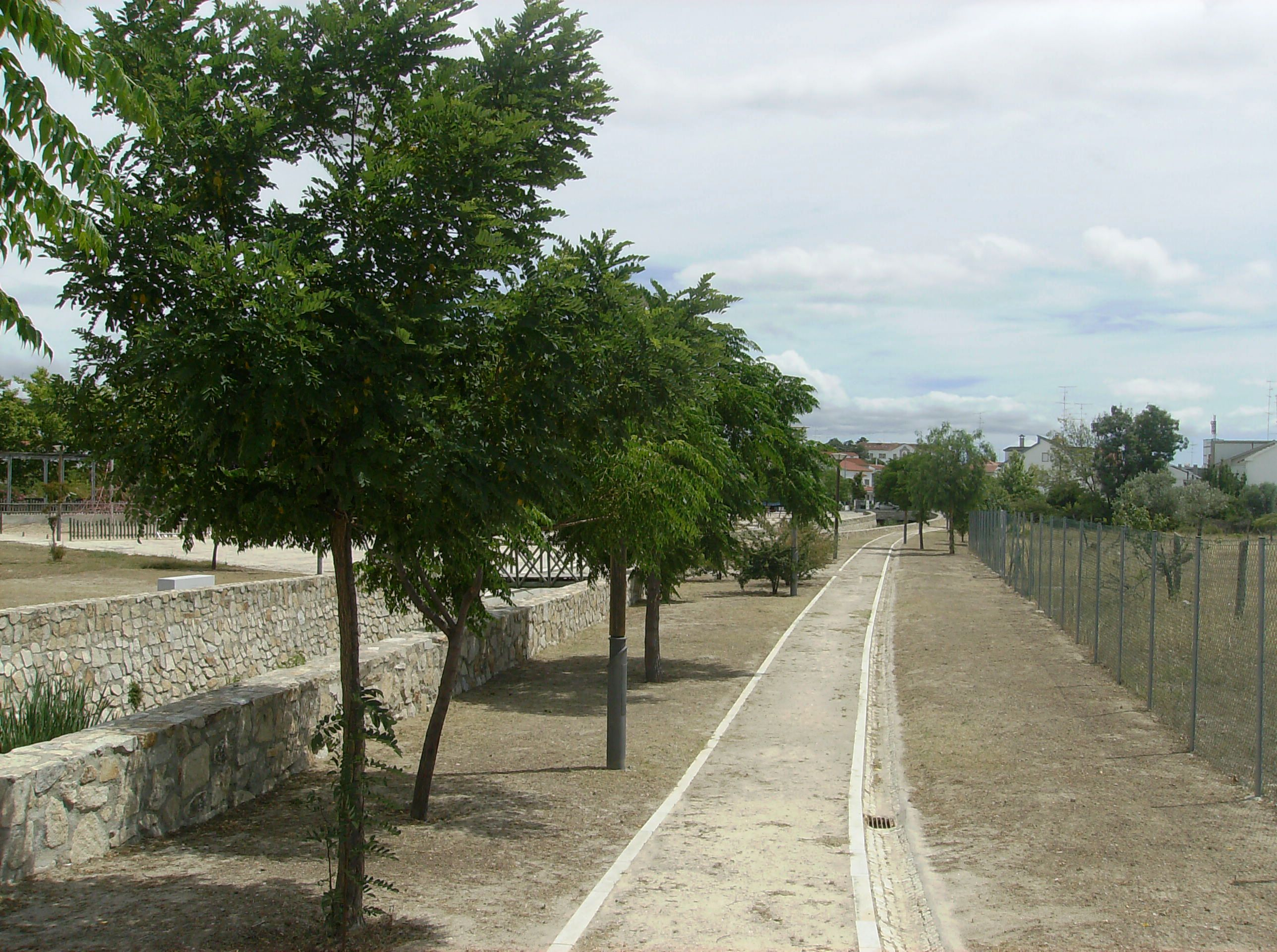 Zona de Lazer, Alcains, Castelo Branco.